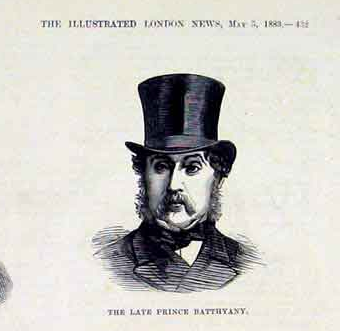 Gustavus Batthyány